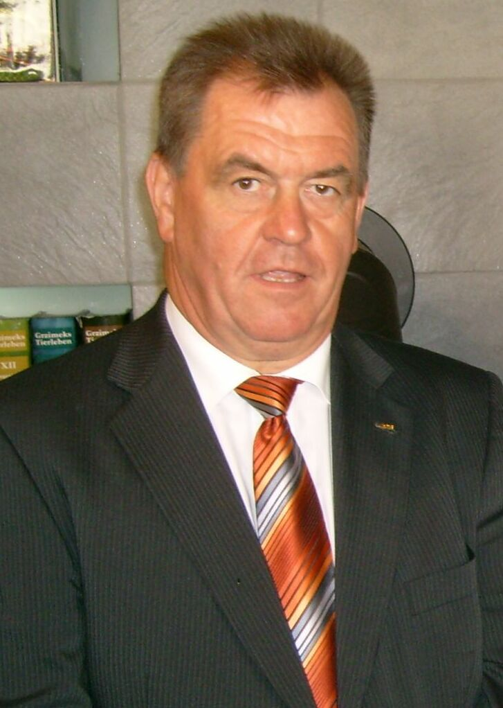 Sujet : Den Ali Kaes an der Ourdall-Bibliothéik bei der Erëffnung vum Veianer Bicherfest 2008. Auteur: lb : User: PlayMistyForMe Source: Eege Foto - 14. September 2008